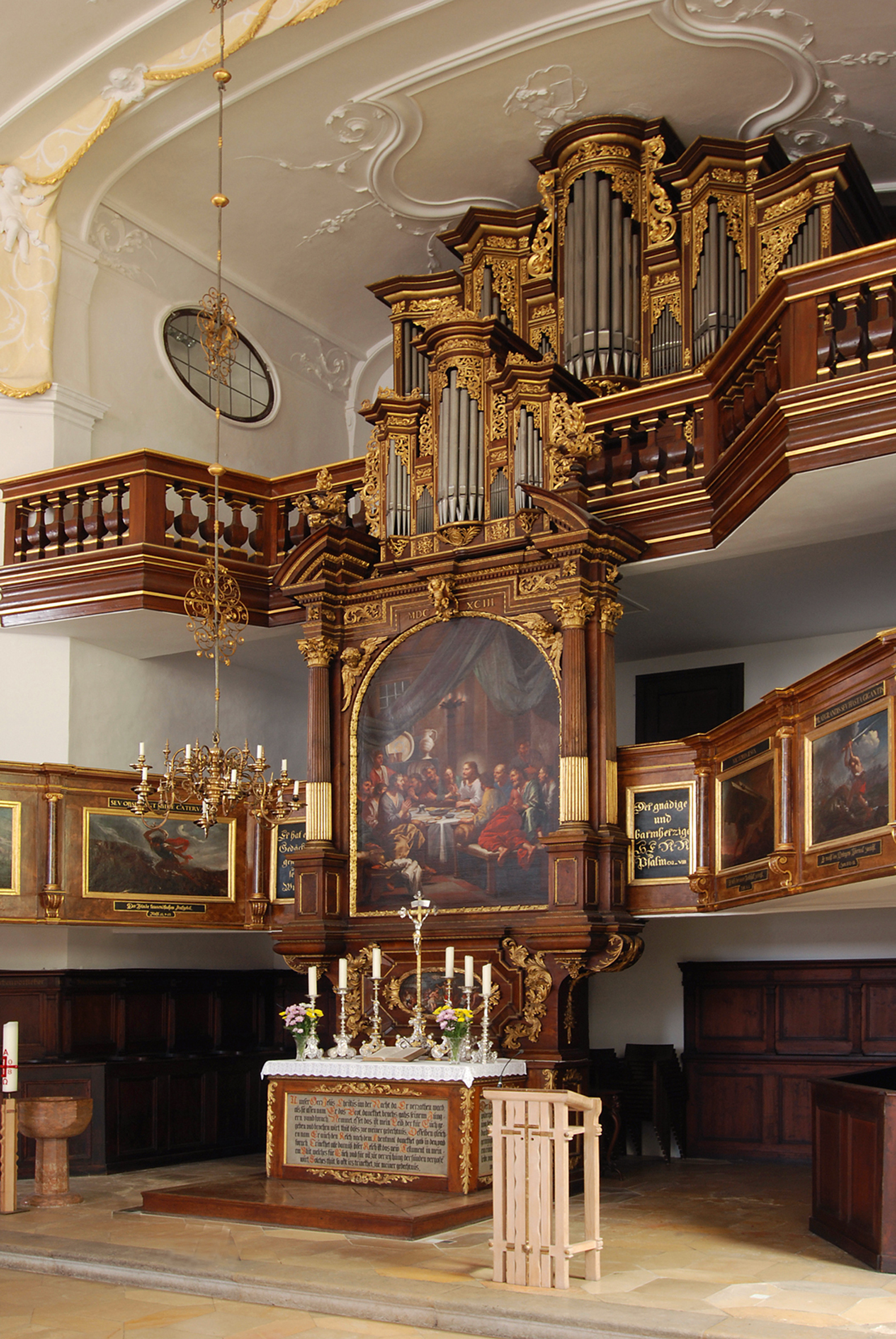 Der Altar der ev. St.Ulrich mit dem Abendmalgemälde von Johann Heiss 1693,ist ein lutherischer Sakramentaltar.